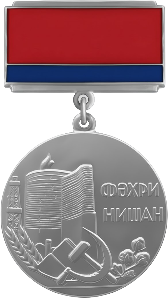 Почётный знак